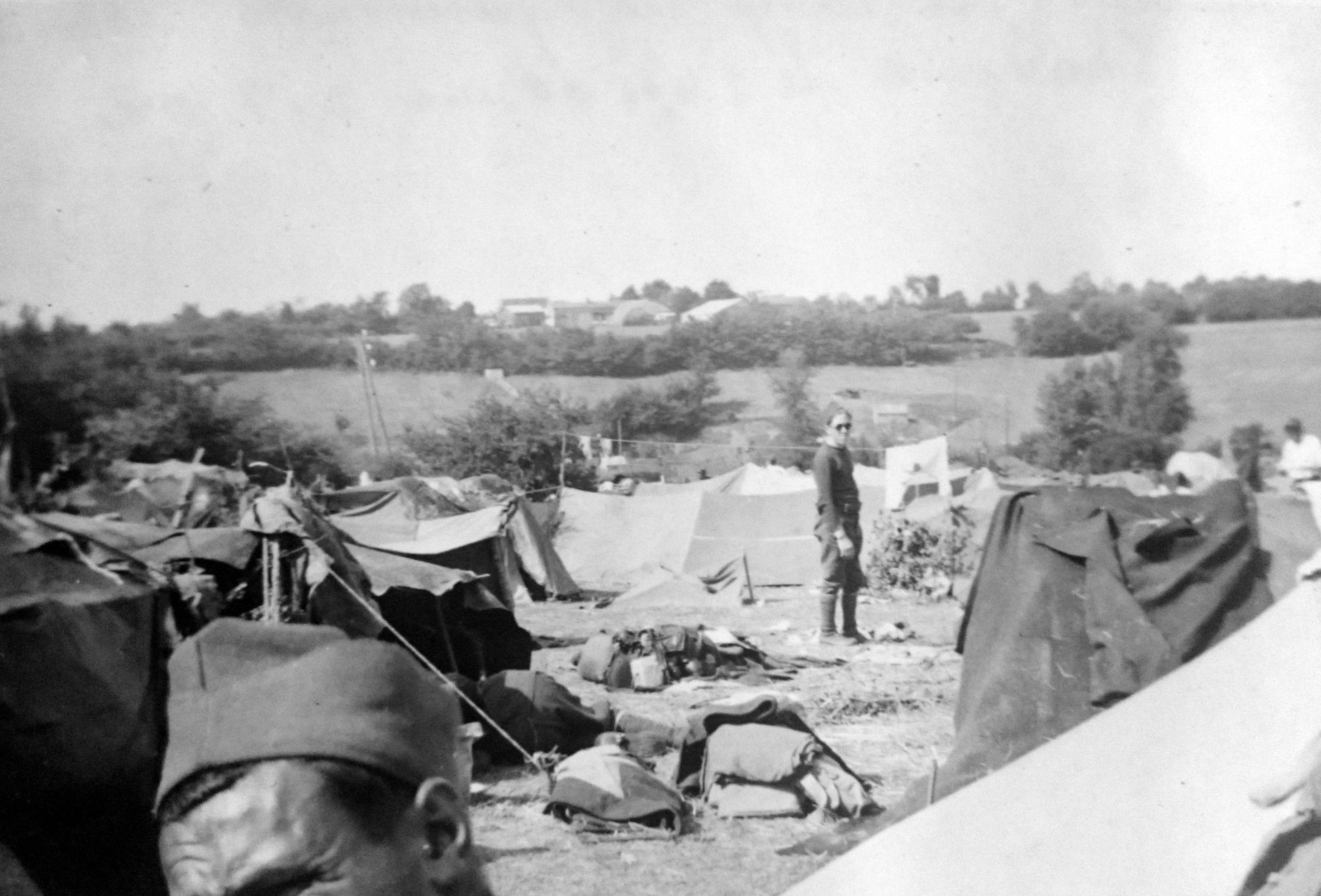 Camps de prisonniers de Charroux dans la Vienne, du 24 juin au 2 juillet 1940.